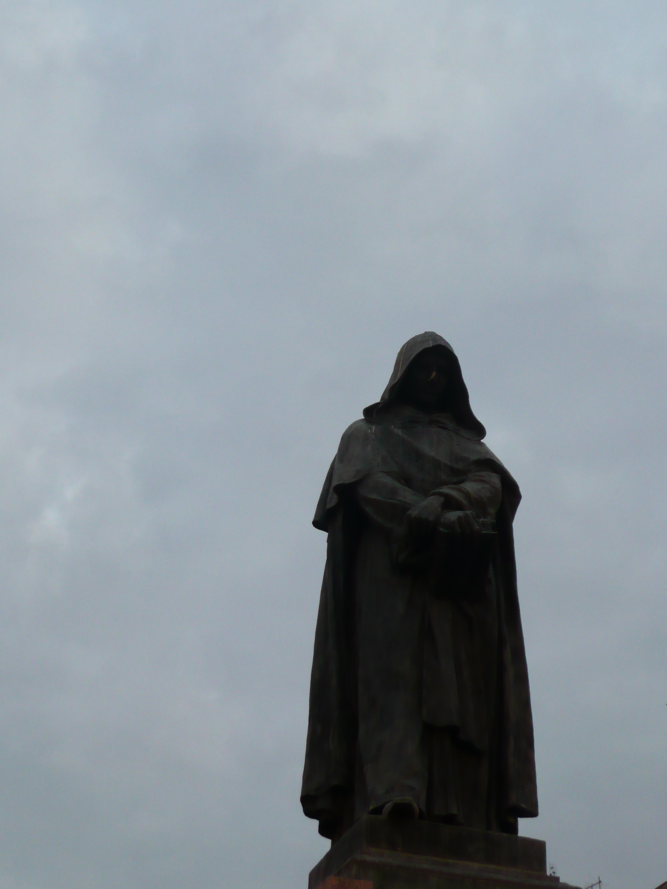 Estatua de Giordano Bruno